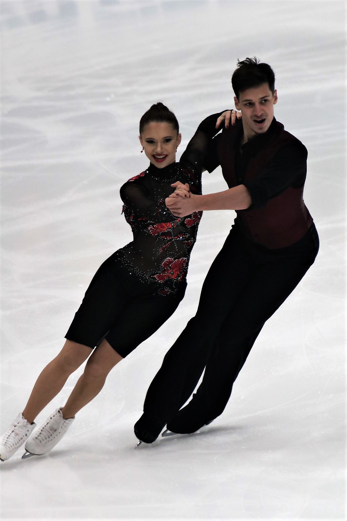 Аннабель Морозов / Андрей Багин (Россия) на Rostelecom Cup 2018